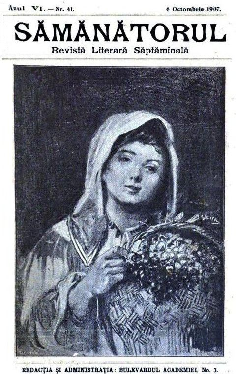 Cover of Sămănătorul